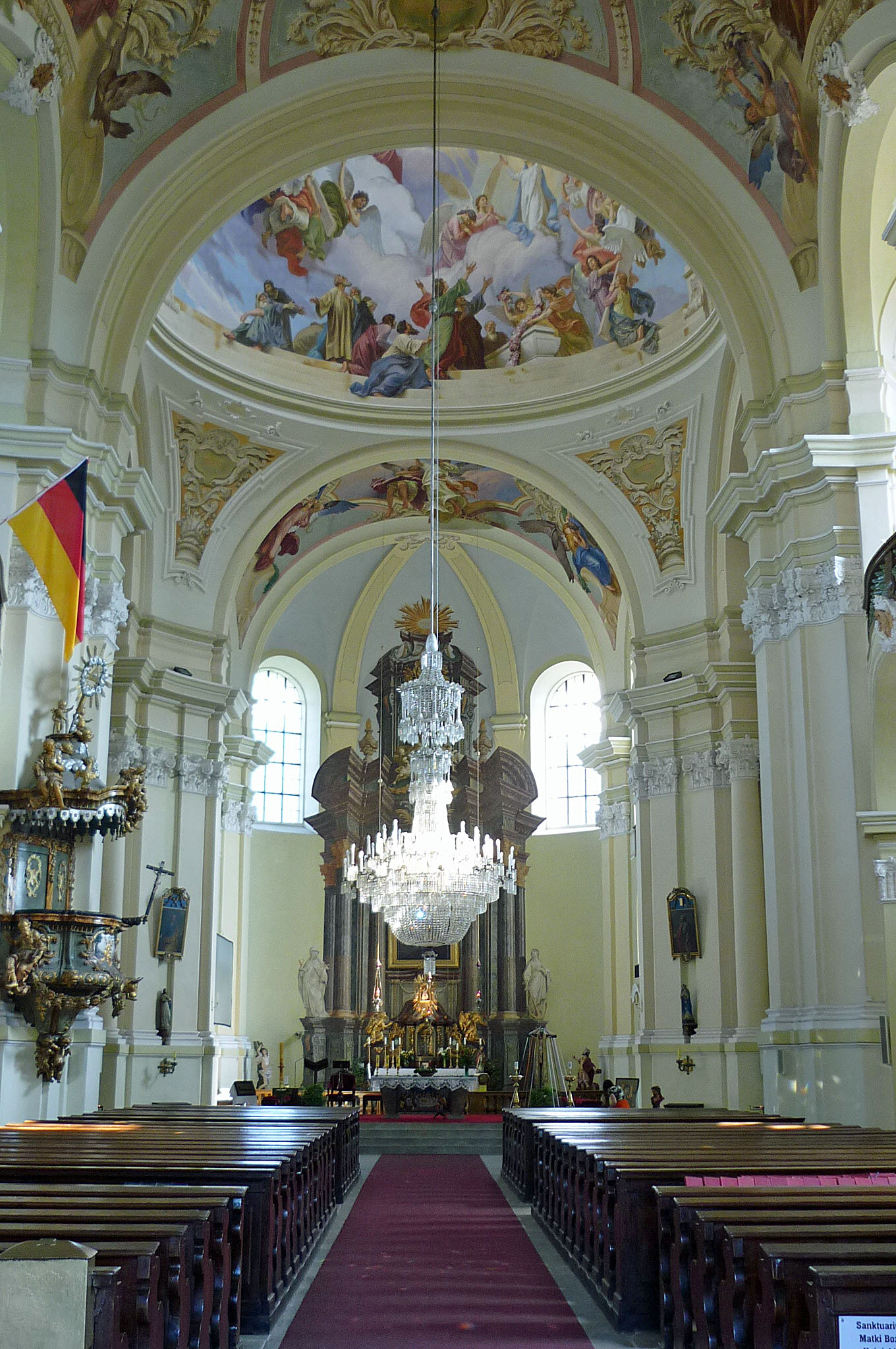 Inneres der Wallfahrtskirche in Haindorf/Hejnice